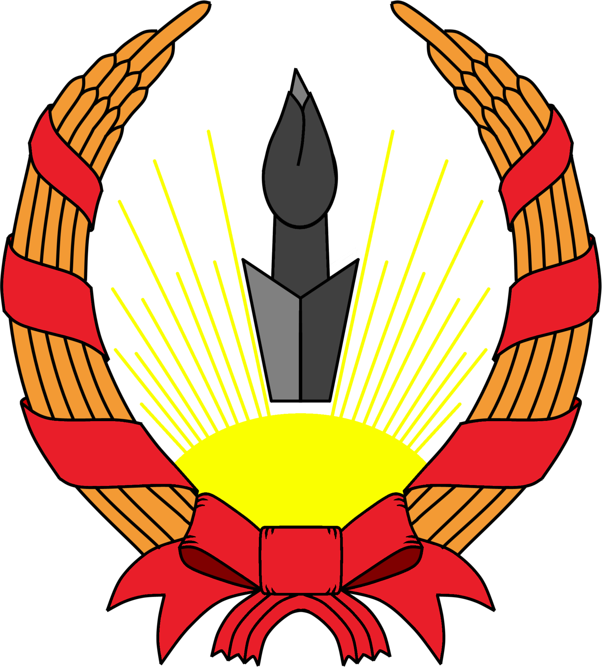 Герб Мехабадской Республики